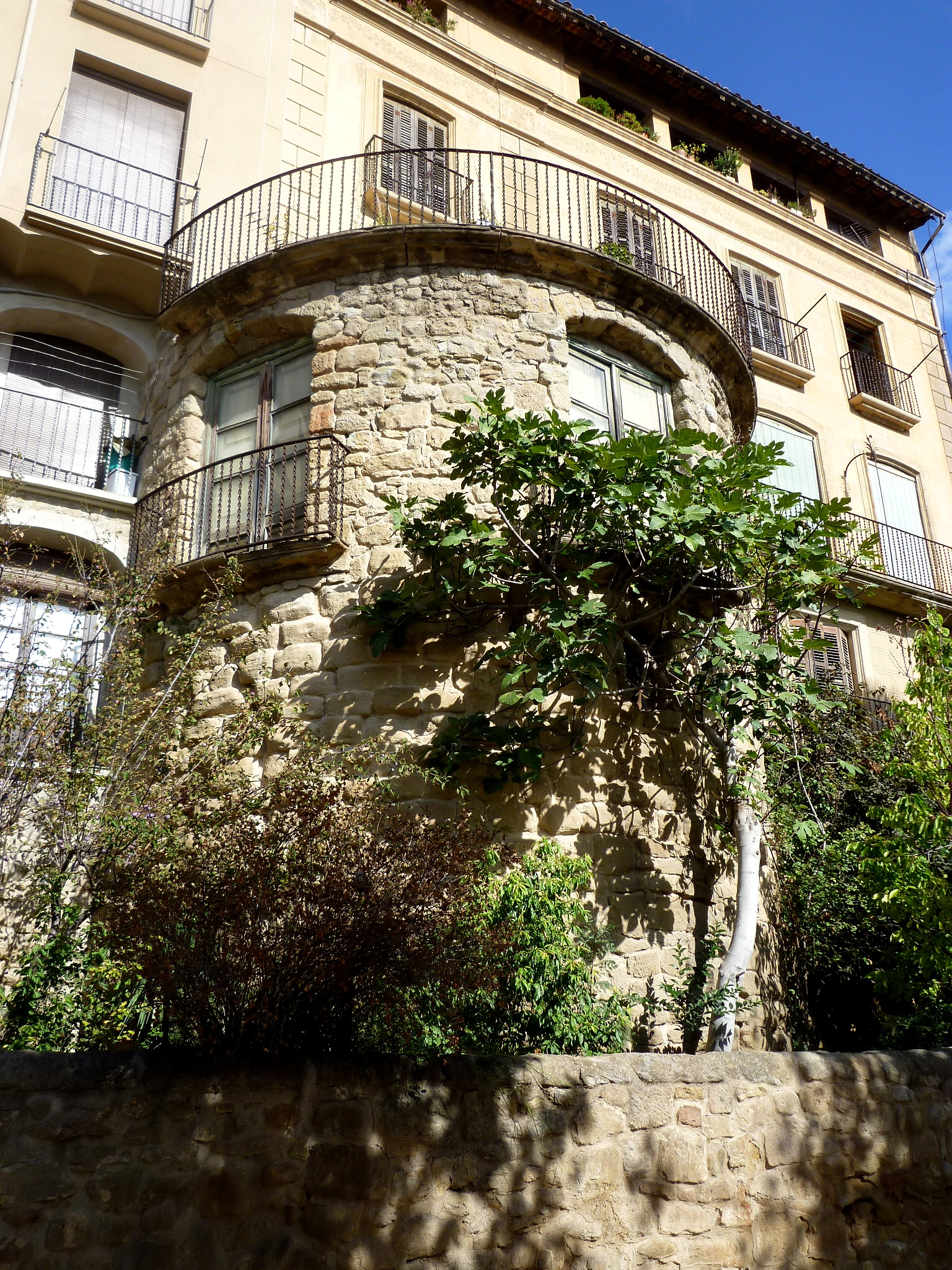 Recinte murat de Solsona: part posterior de ca la llucianeta